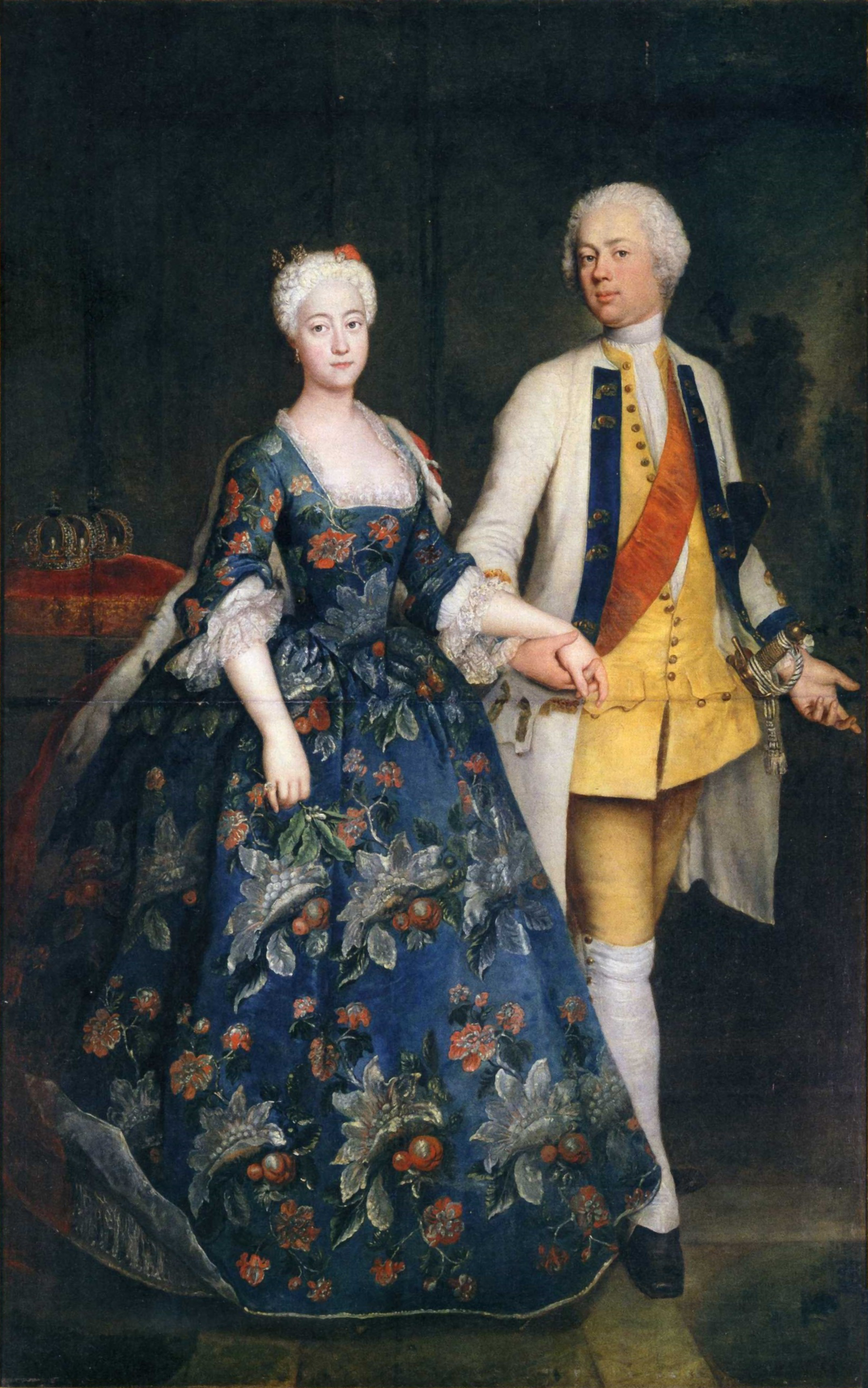 Sophie von Preußen mit ihrem Gemahl Markgraf Friedrich Wilhelm von Brandenburg-Schwedt. Öl auf Leinwand. Stiftung Preußische Schlösser und Gärten, GK I 1021